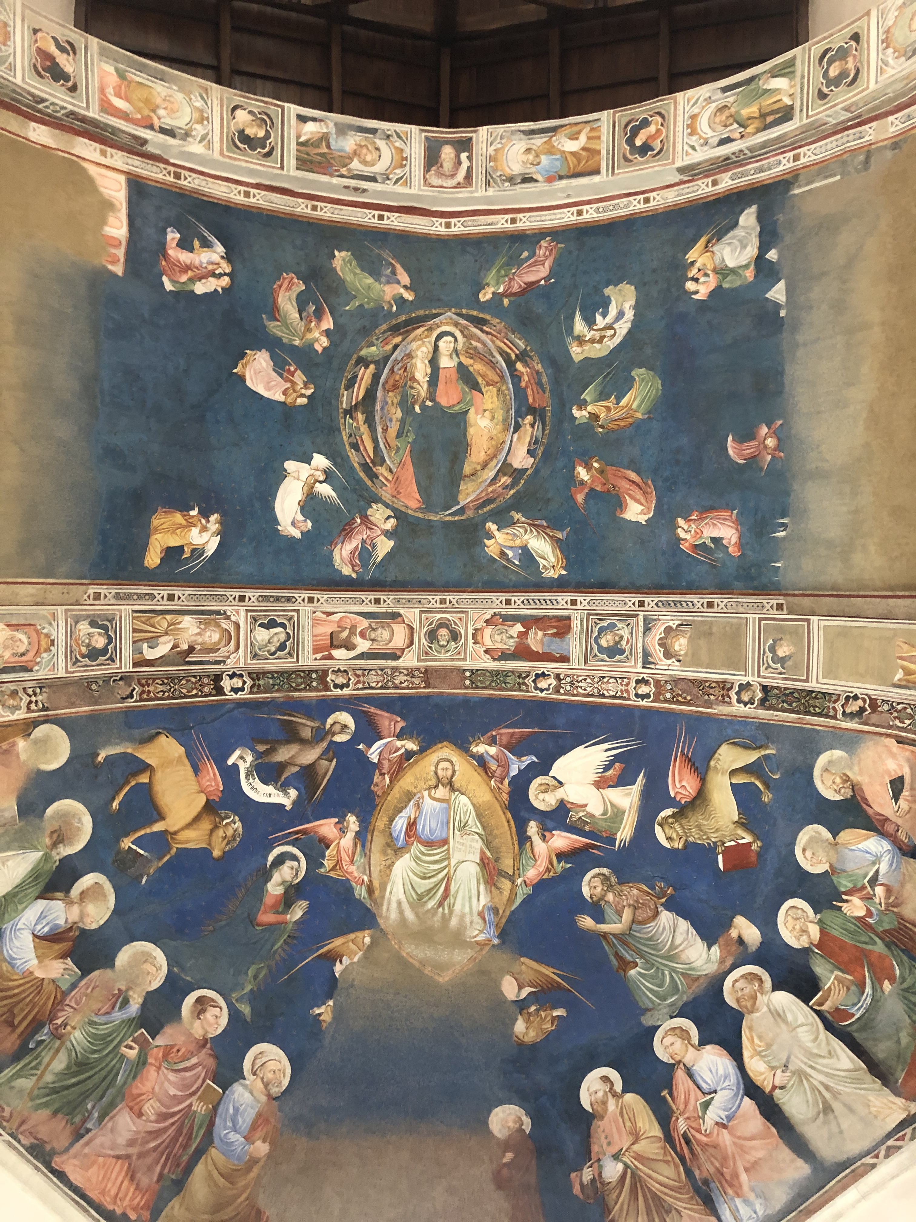 L'abside della chiesa di San Silvestro in L'Aquila. L'opera di Maestro di Beffi